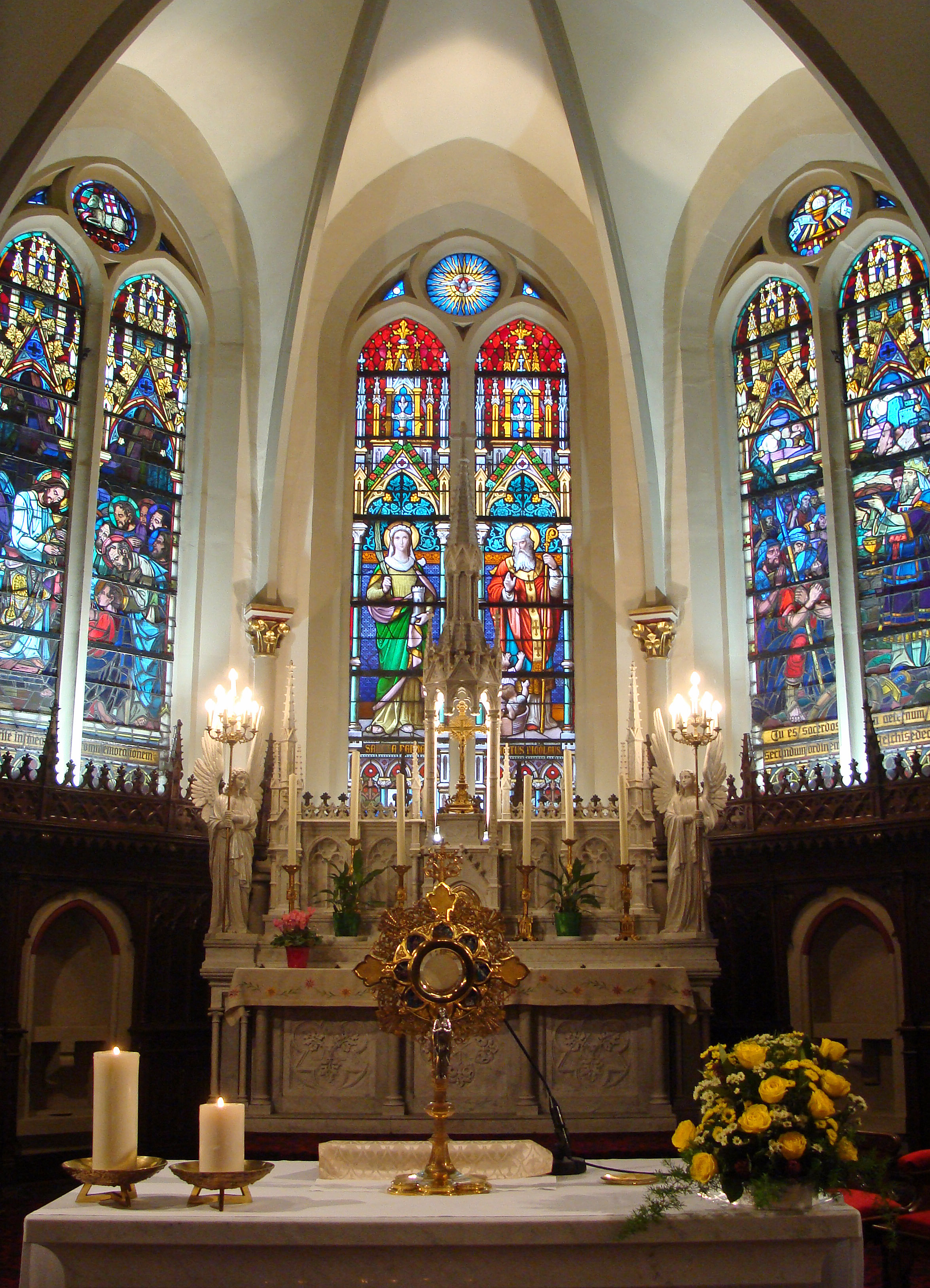 choeur de l'église Saint-Nicolas de L'Hôpital (Moselle)